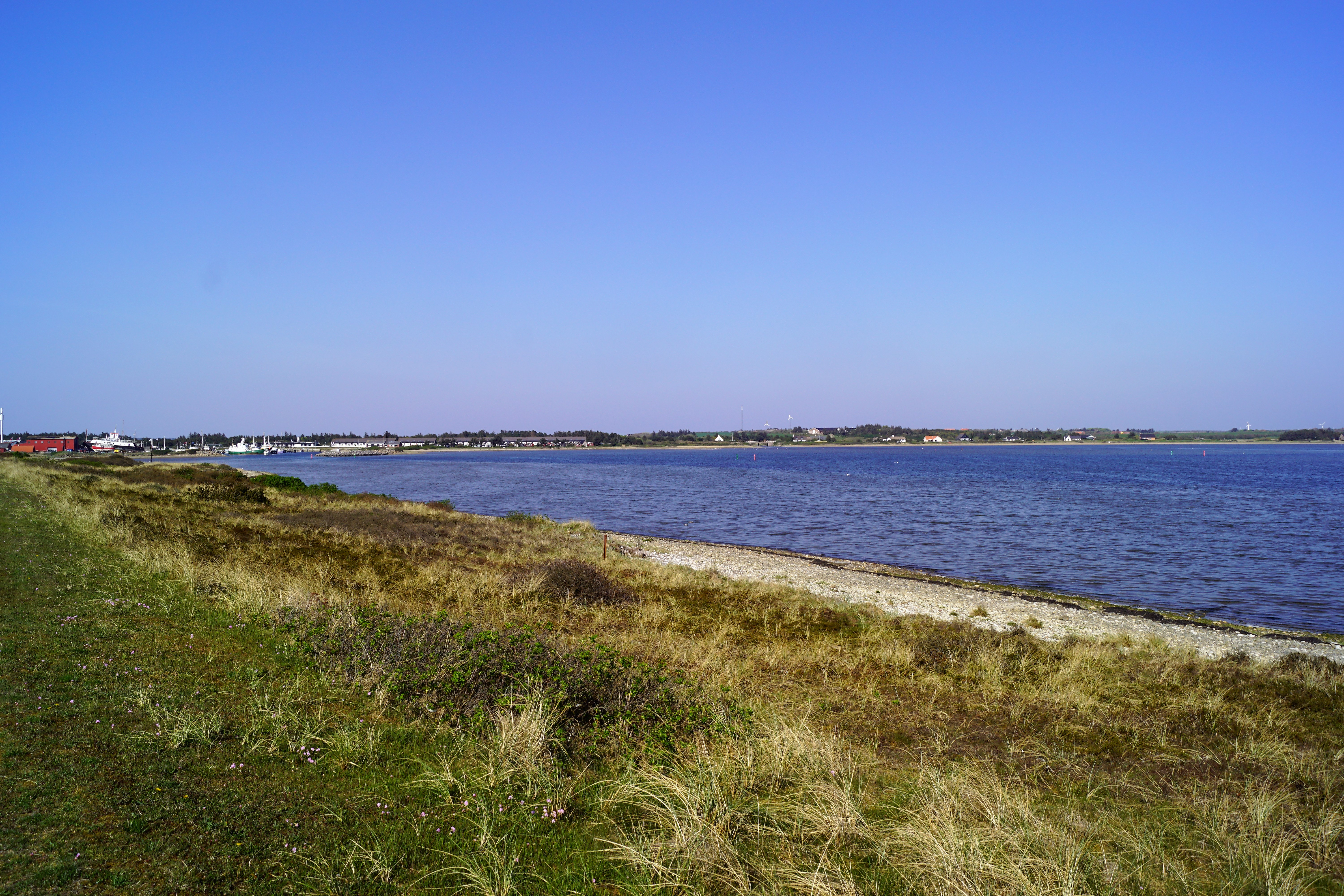 Krik Vig set mod nordøst fra fra vejdæmningen